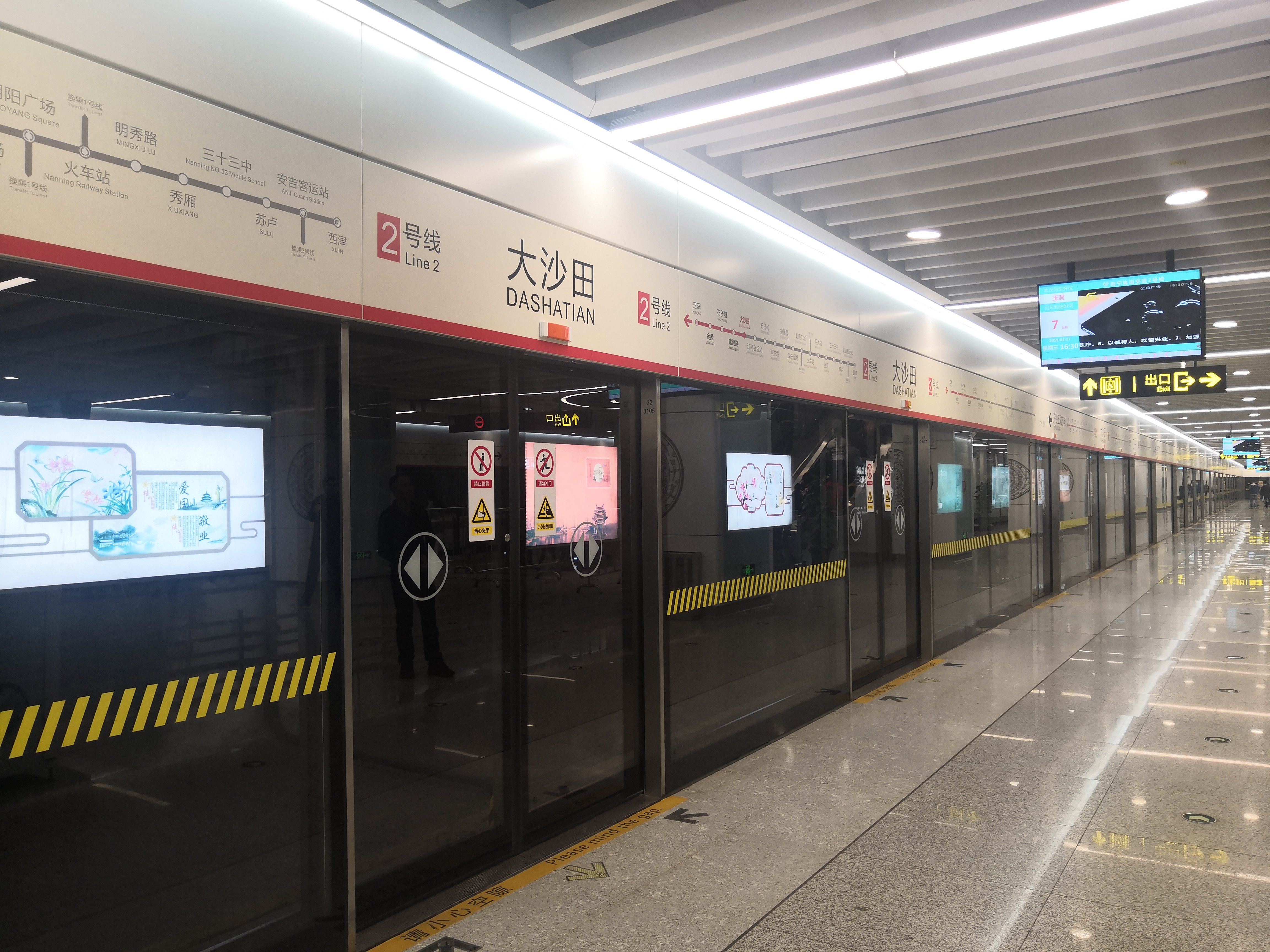 nnrt line 2